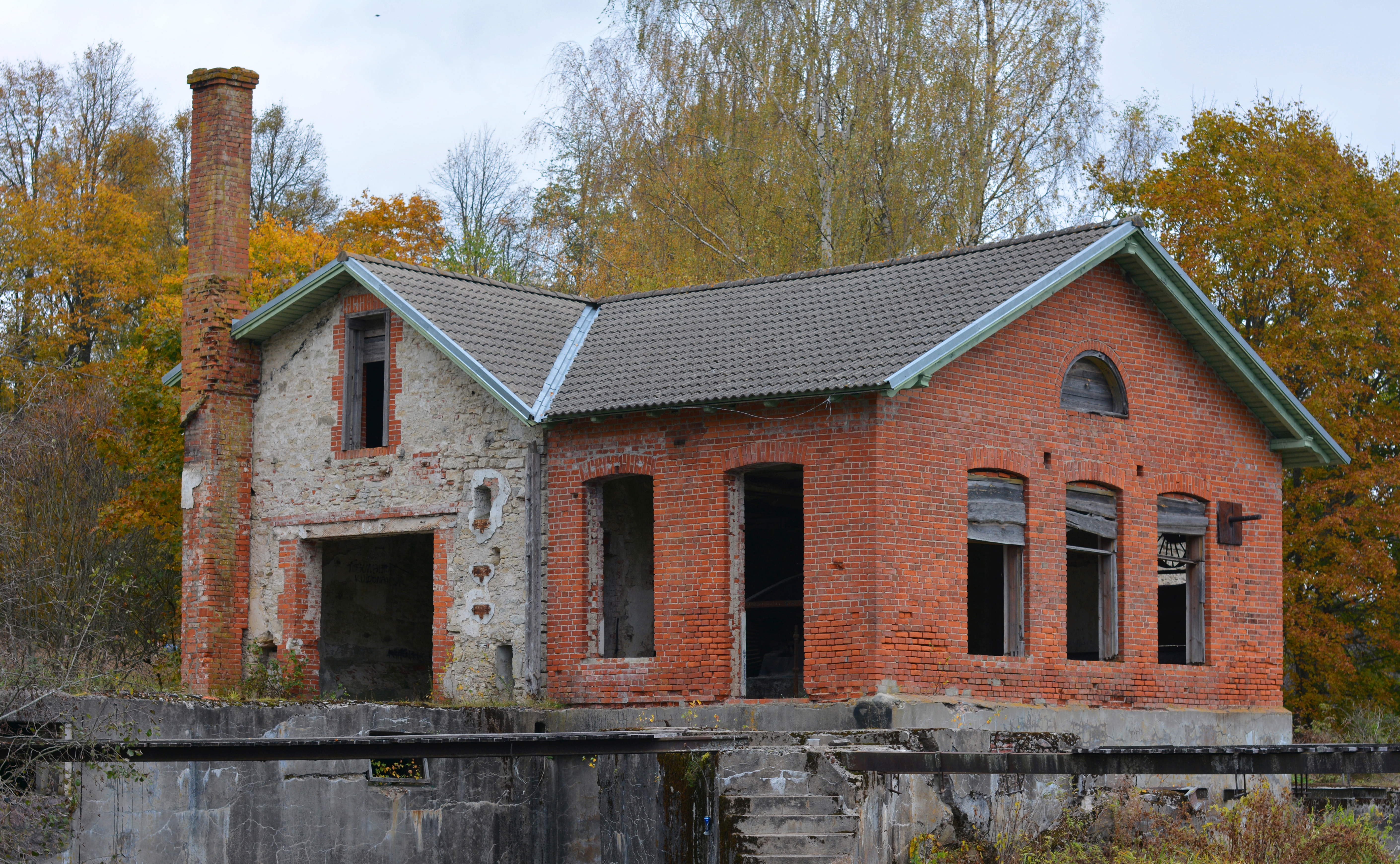 Jändja vesiveski varemed. Veskikompleks on rajatud 20. sajandi alguses.